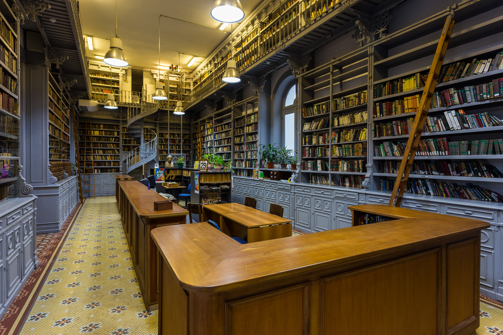 Sala de Lectura de la Biblioteca Central de Educación Secundaria "Dr. Carlos Real de Azúa", ubicada en el Instituto Alfredo Vásquez Acevedo (I.A.V.A.), Montevideo.